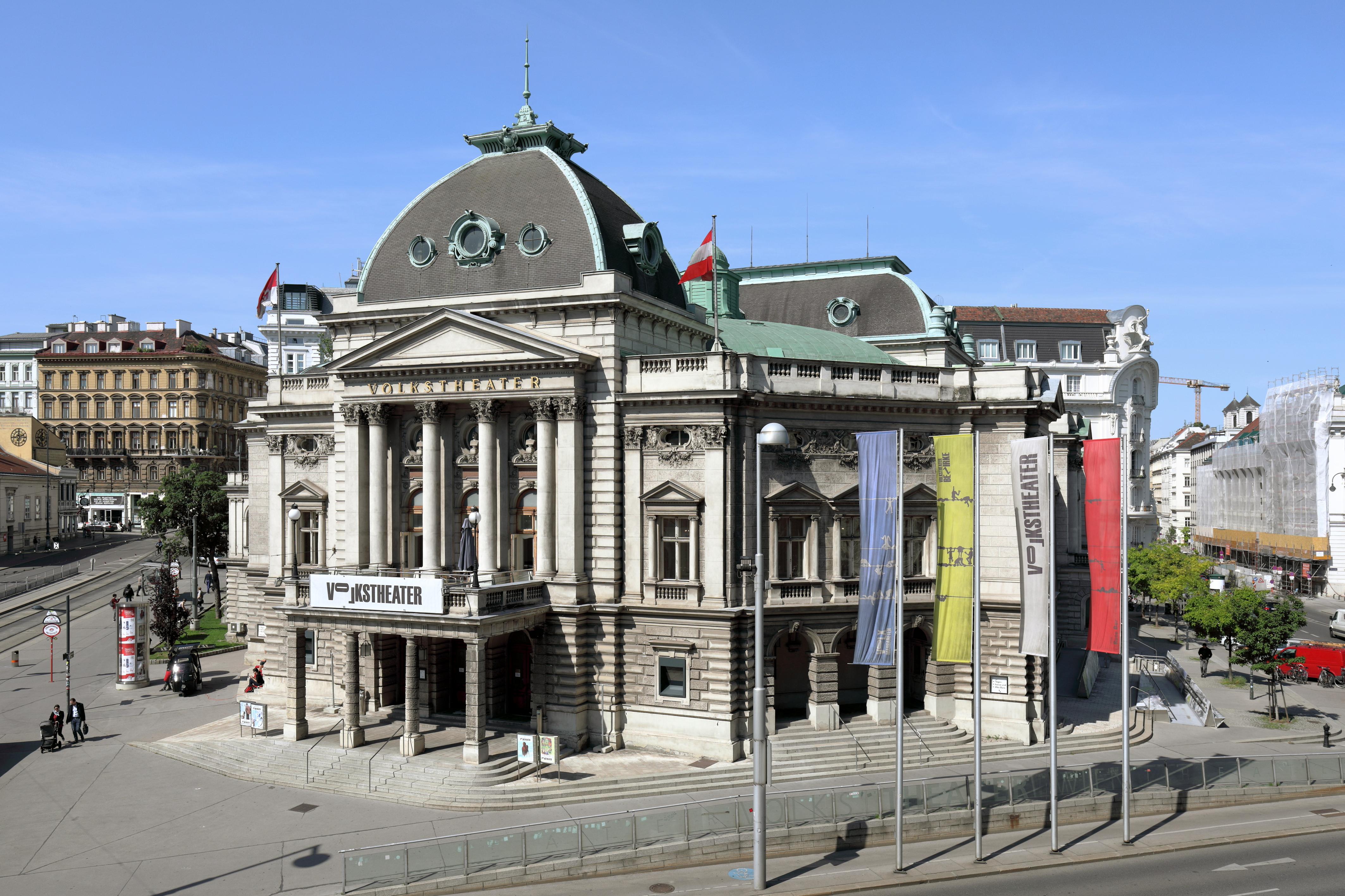 Ostansicht des Volkstheater am Arthur-Schnitzler-Platz im 7. Wiener Gemeindebezirk Neubau.Das Theater wurde ab 1887 nach Plänen von Hermann Helmer und Ferdinand Fellner in Neorenaissanceformen errichtet und am 14. September 1889 mit Ludwig Anzengrubers Schauspiel „Der Fleck auf der Ehr’“ als Deutsches Volkstheater eröffnet. Über dem Hauptportal befinden sich die Büsten von Ferdinand Raimund, Johann Nestroy und Franz Grillparzer. Diese wurde im Zuge der Generalsanierung 1989 angebracht. Ursprünglich gab es welche von Friedrich Schiller, Gotthold Ephraim Lessing und Grillparzer.